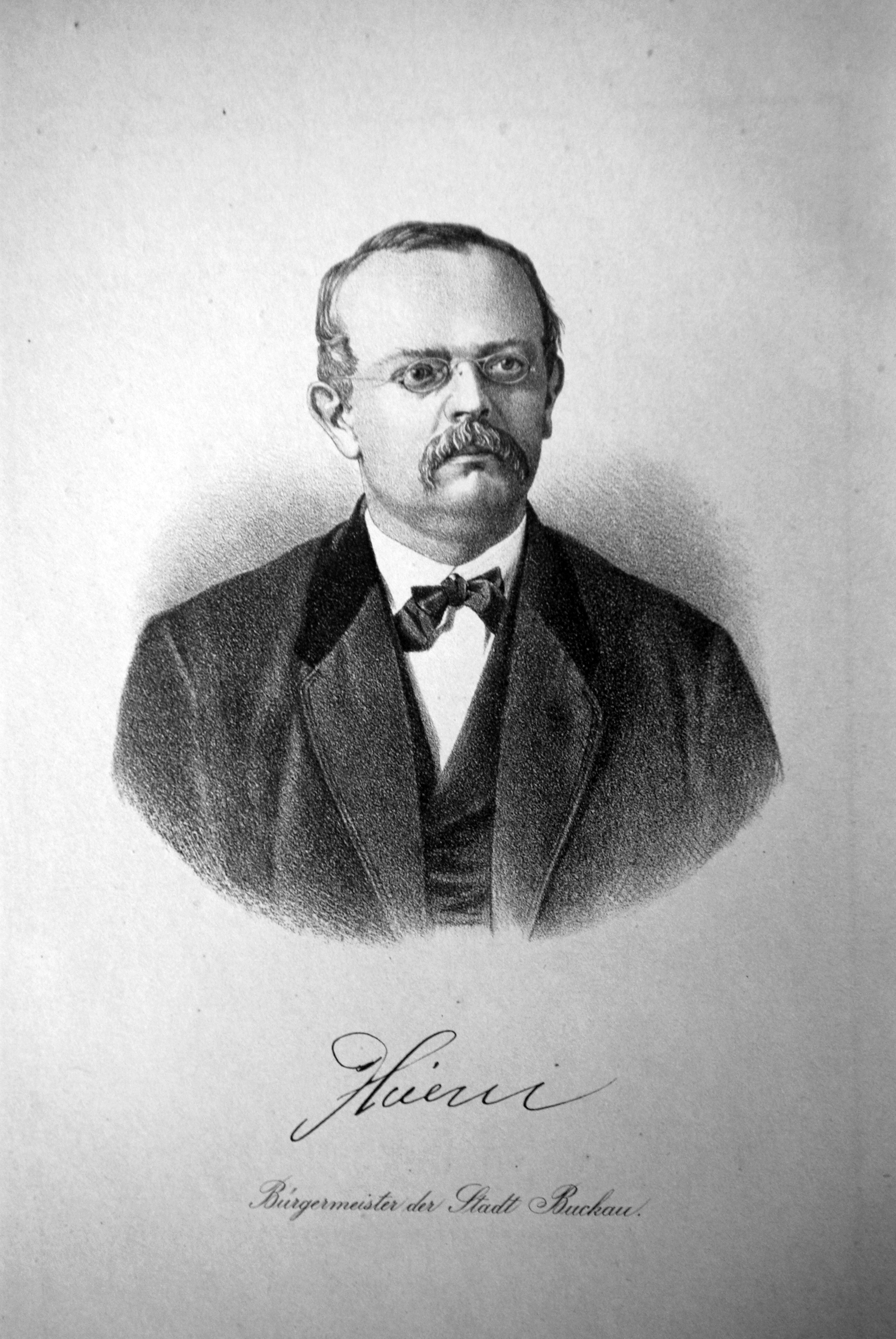 Bruno Thiem (1823-1913) war Kommunalpolitiker und Bürgermeister der Städte Kelbra und Buckau (letzteres ab 1887 Stadtteil von Magdeburg).